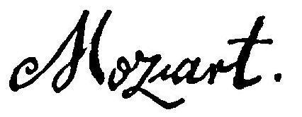 Signature de Wolfgang Amadeus Mozart (1756-1791) au bas de l'acte de décès (acte de sépulture) de sa mère, Anna Maria Pertl (1720-1778), le 3 juillet 1778 dans le registre paroissial de l'église Saint-Eustache à Paris. Il s'agit d'un fac-similé par l'archiviste Auguste Jal (1795-1873) dans son Dictionnaire critique de biographie et d'histoire (1872, p.893), le registre paroissial original ayant brûlé pendant les incendies de la Commune de Paris (1871) avec tout l'état civil de Paris.